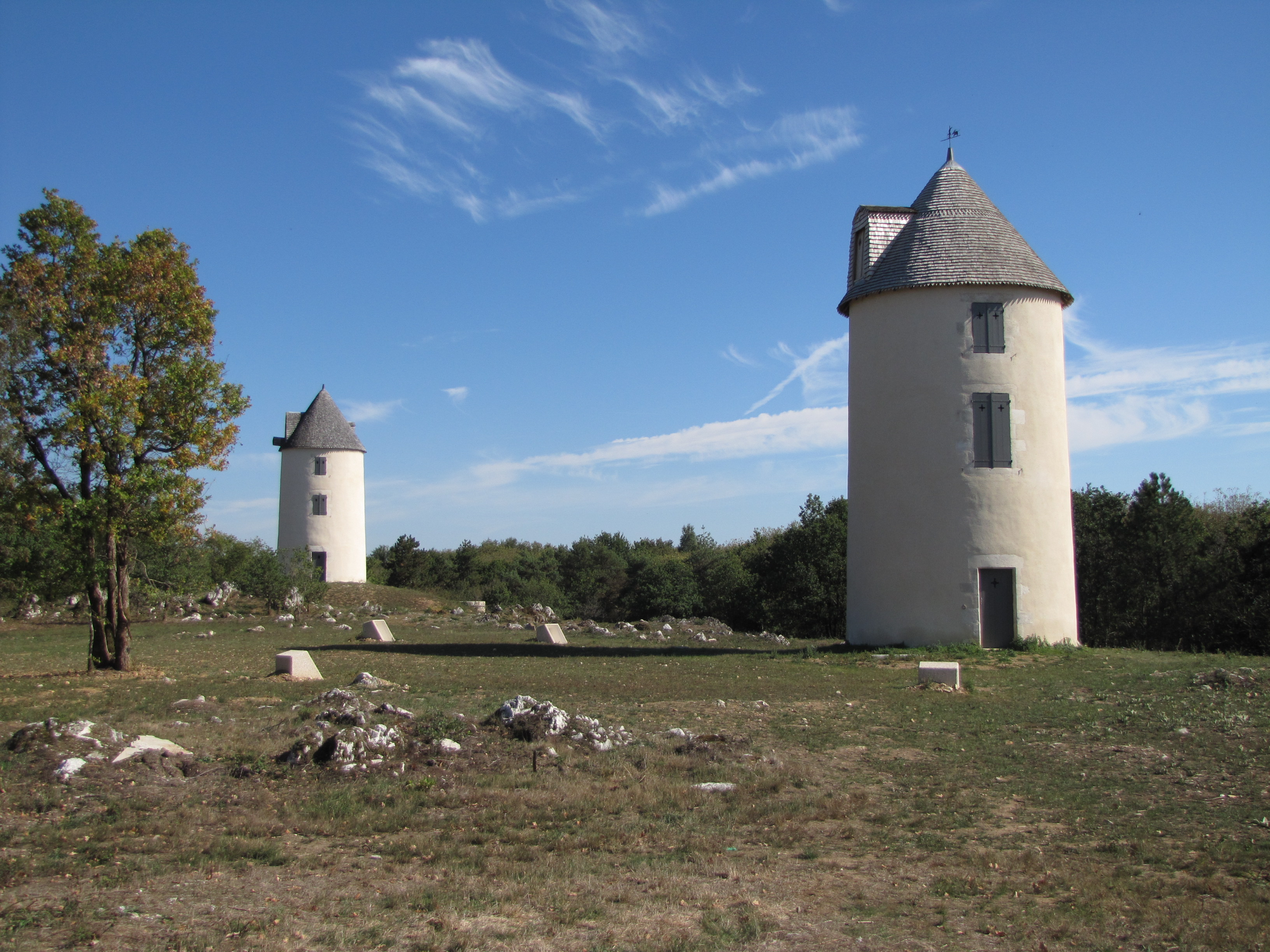 Moulin à vent de Mouilleron-en-Pareds